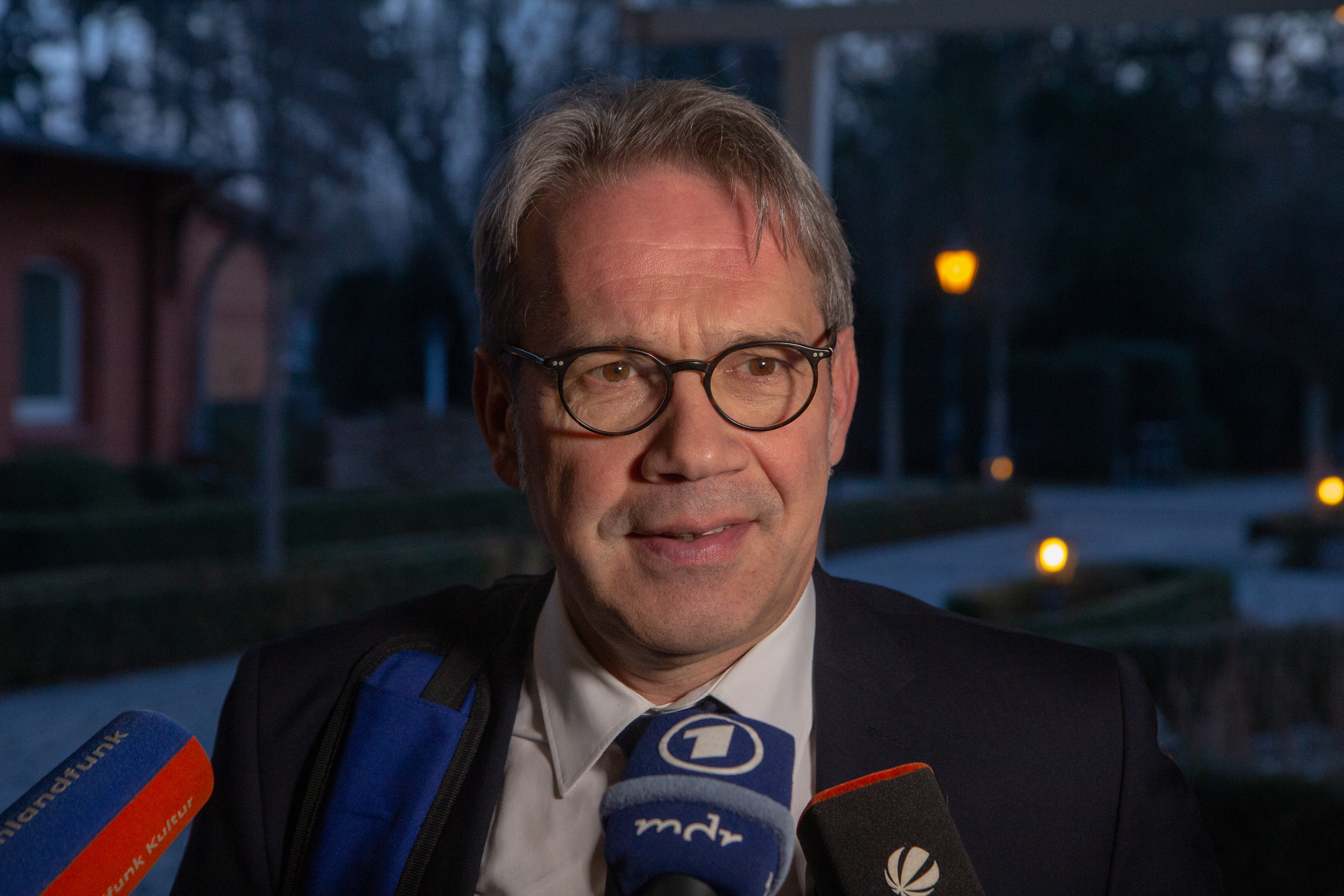 Georg Maier zu Beginn der 209. Innenministerkonferenz ivom 28.-30. November n Magdeburg